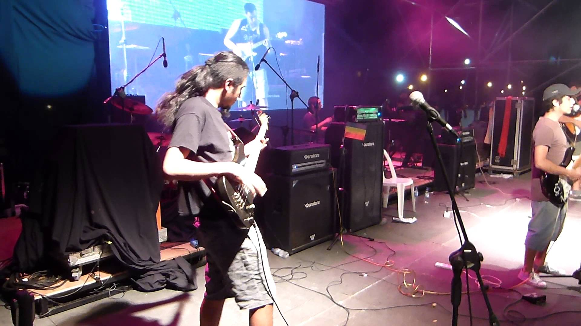 Los Hijos de Cladia tocando en el Varela Rock del 2014.